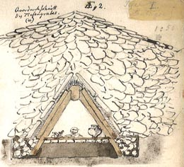 Die hölzerne Totenkammer und die Steinpackung in der Skizze von Klopfleisch, darüber erhob sich der Erdhügel.